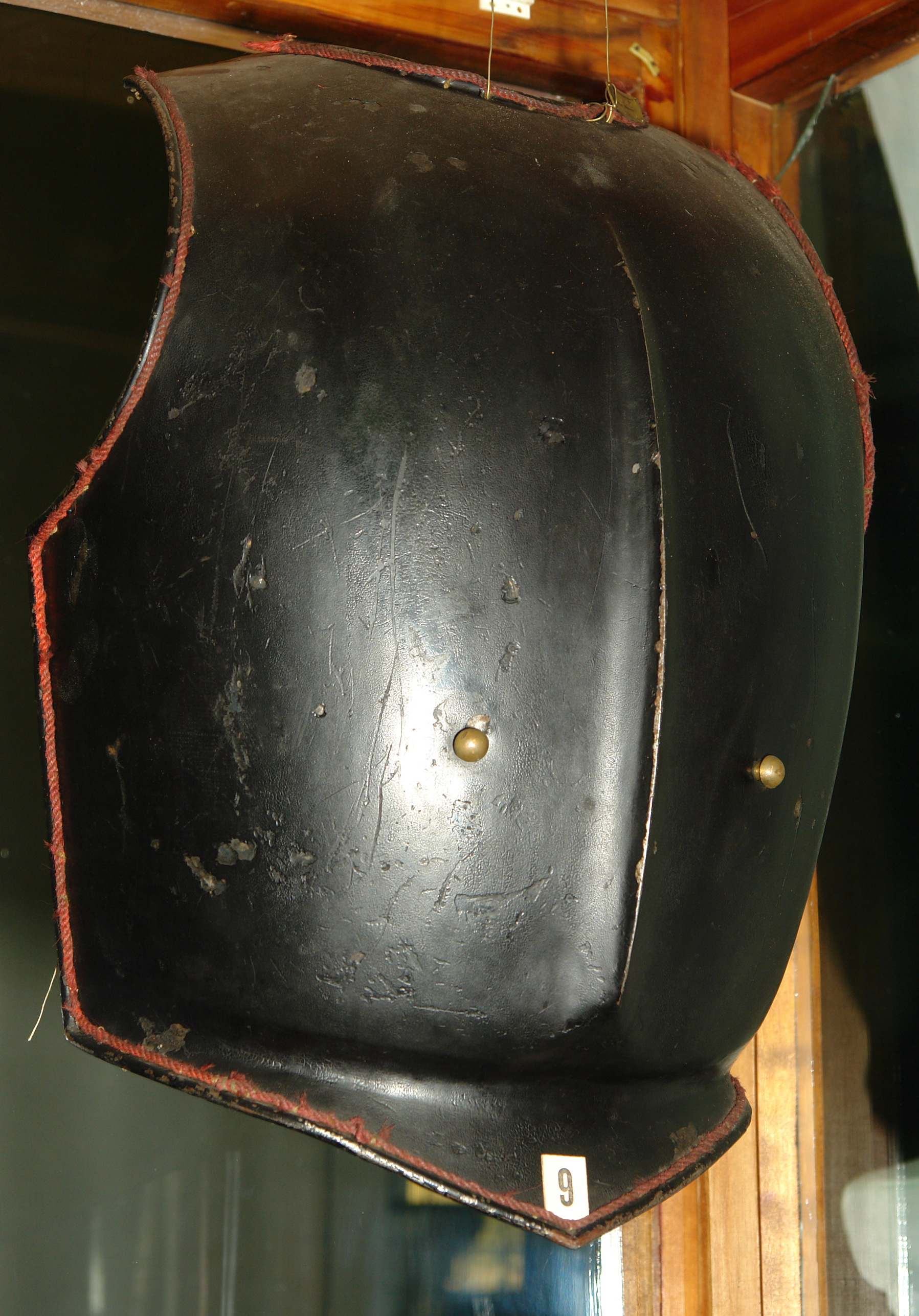 9. Кираса офицерская кирасирских полков обр. 1812 г. Военно-исторический музей артиллерии, инженерных войск и войск связи, Санкт-Петербруг.